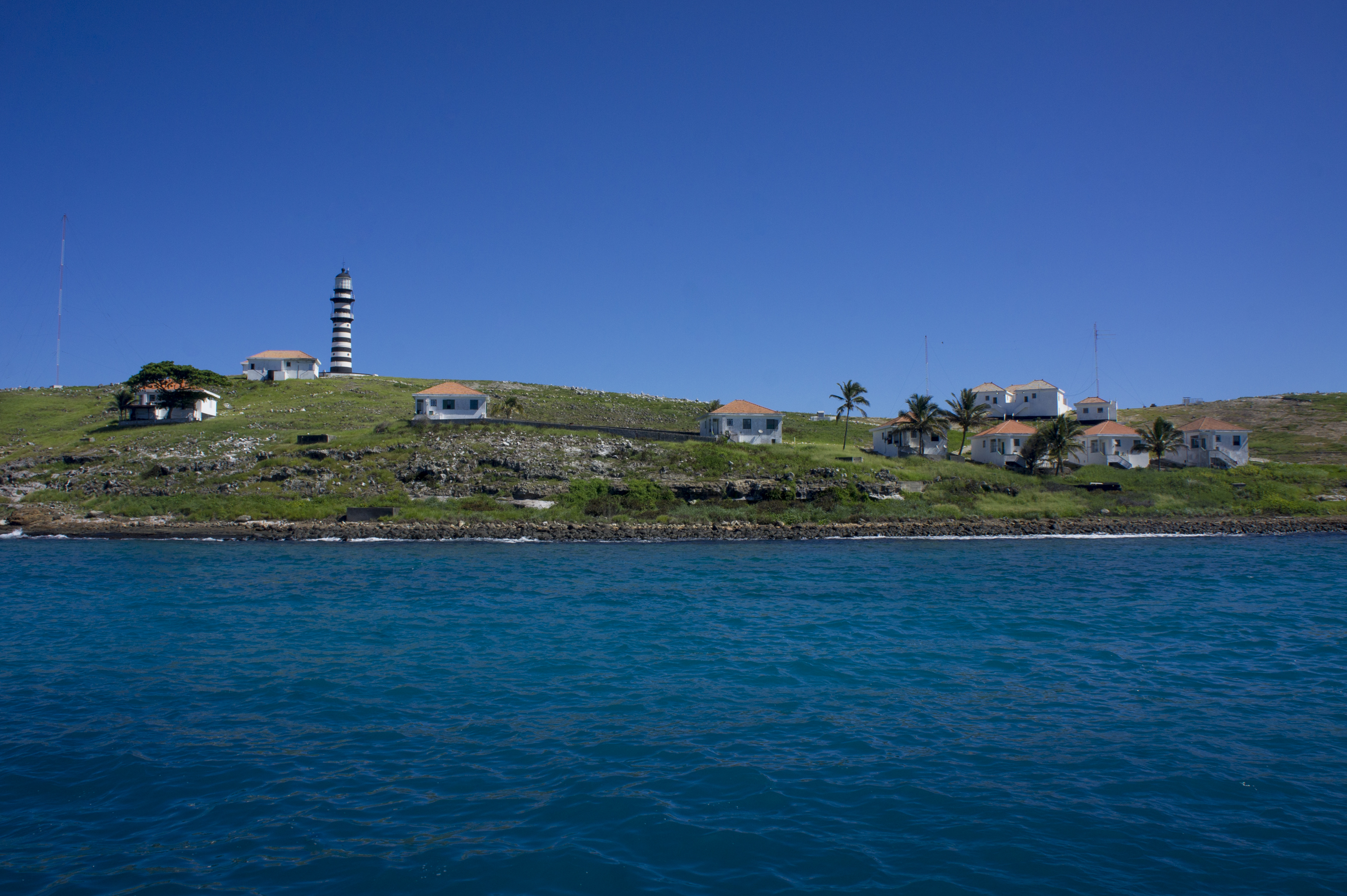 Ilha de Santa Bárbara, área militar, em Arquipelago dos Abrolhos-BA